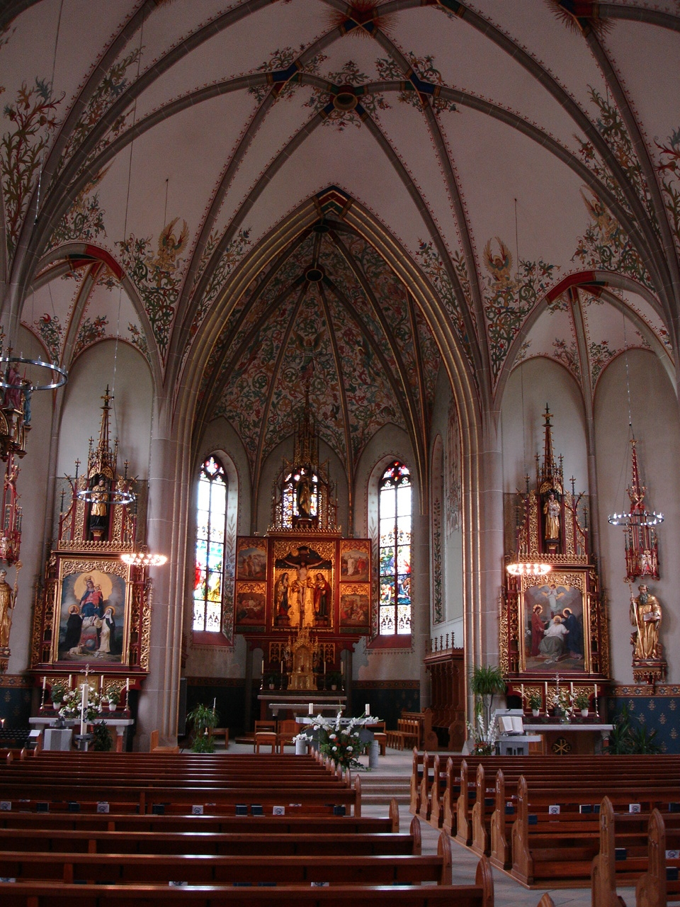 Pfarrkirche St. Joseph in Abtwil, Innenansicht